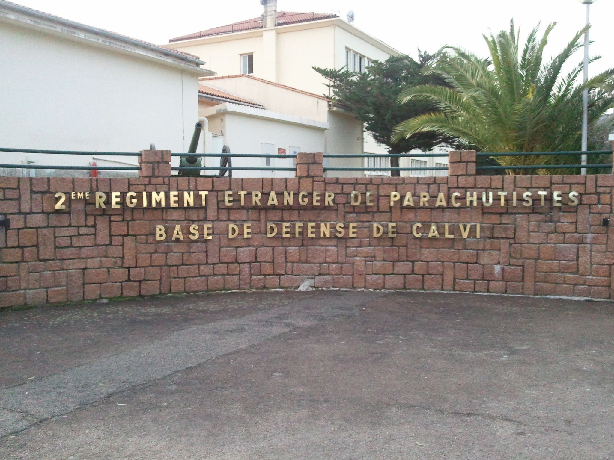 Entrée de Camp Raffalli